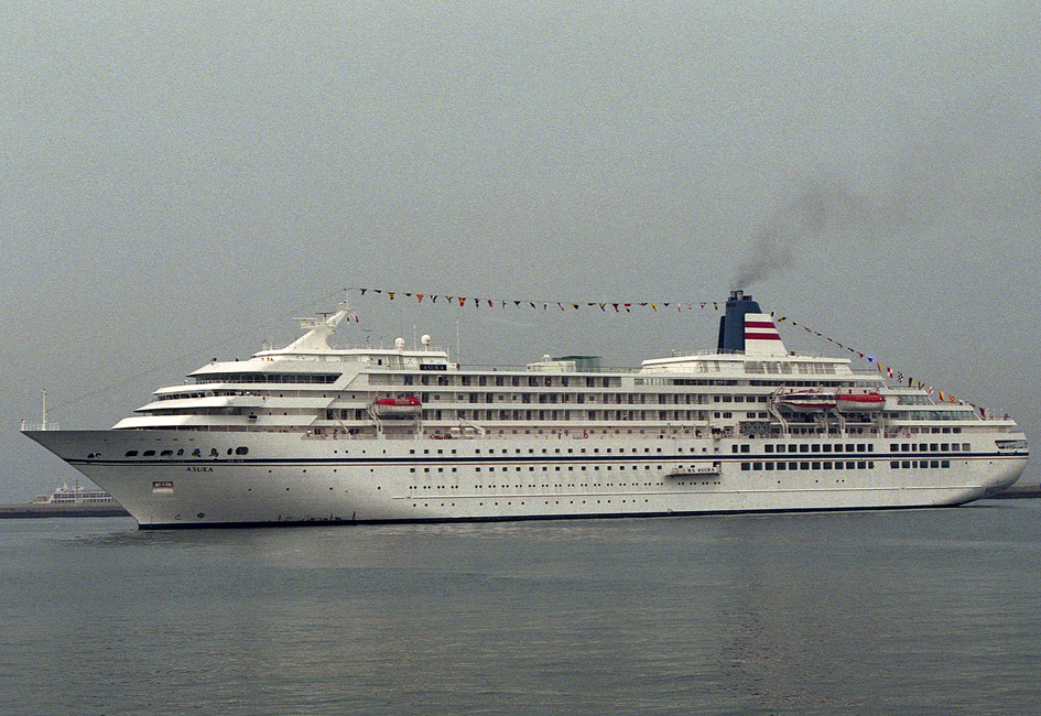 日本郵船 「飛鳥」